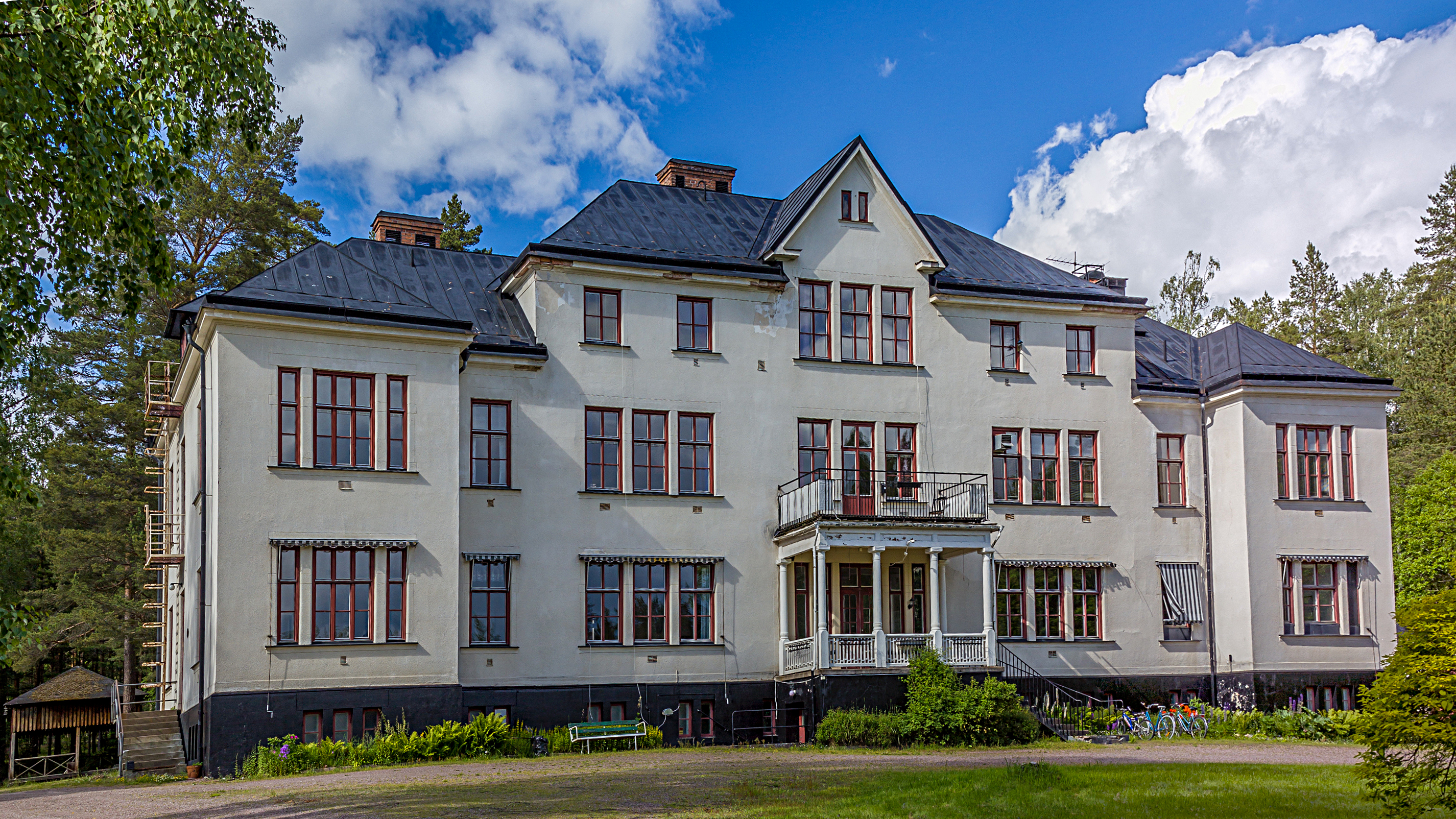 Tjärnans barnsanatorium, Hedemora kommun, Dalarnas län, Sverige. Numera privat.